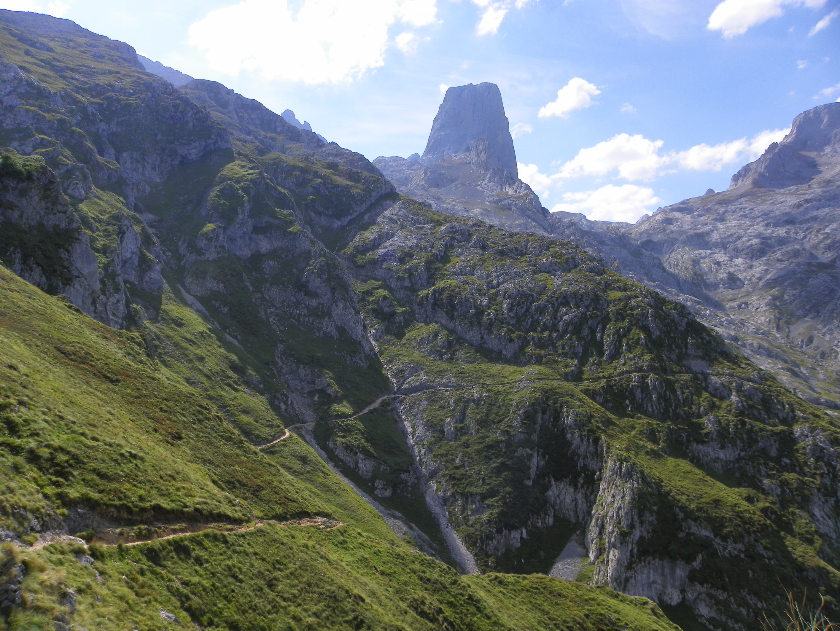 Picos de Europa This is a photography of a Special Area of Conservation in Spain with the ID: ES1200001. Natura2000 entry, EEA entry